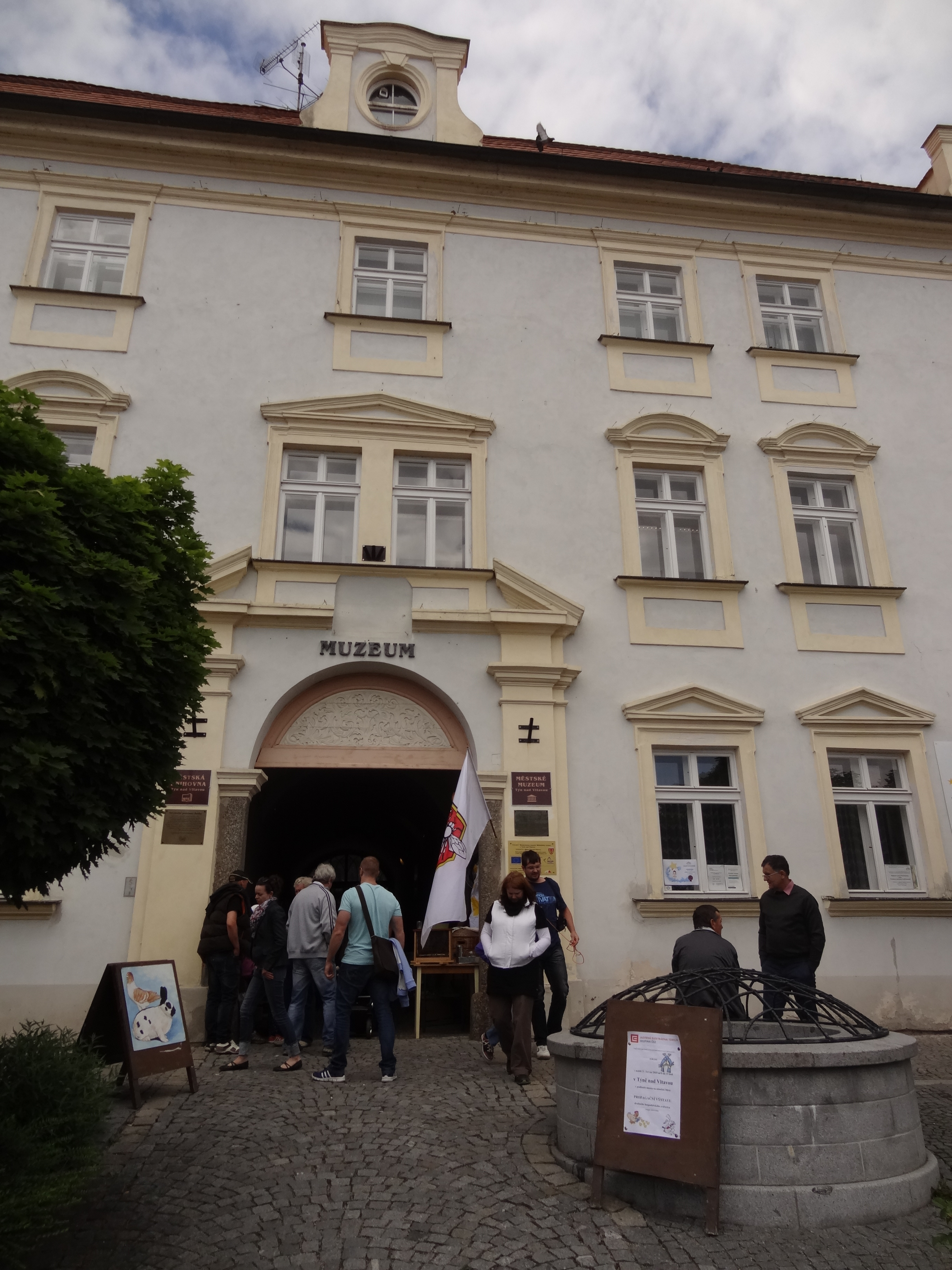 Zámek Týn nad Vltavou, náměstí Míru 1, Týn nad Vltavou.